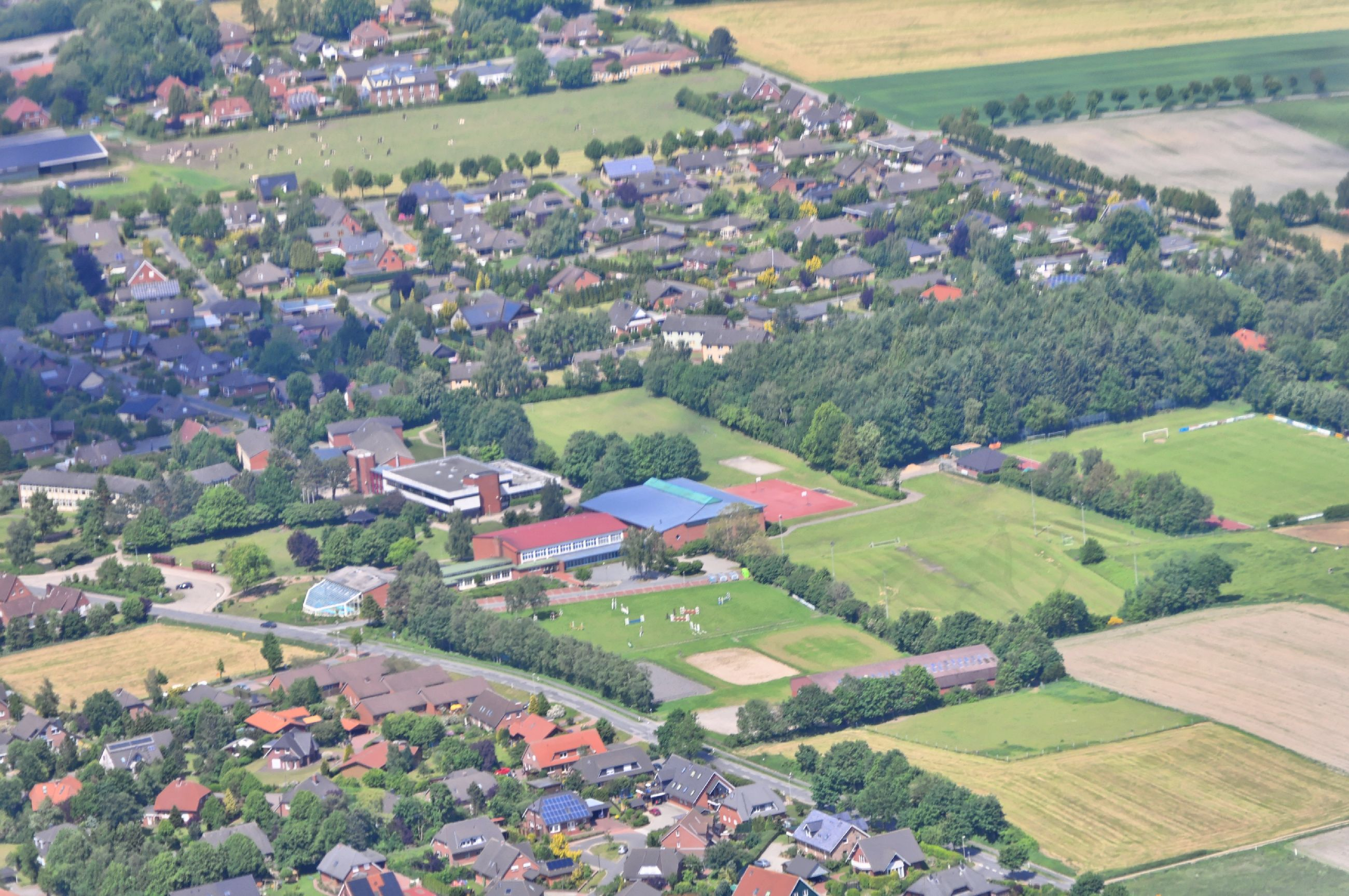 Überführungsflug vom Flugplatz Schwarzheide-Schipkau über Potsdam, Lüneburg zum Flugplatz Nordholz-Spieka